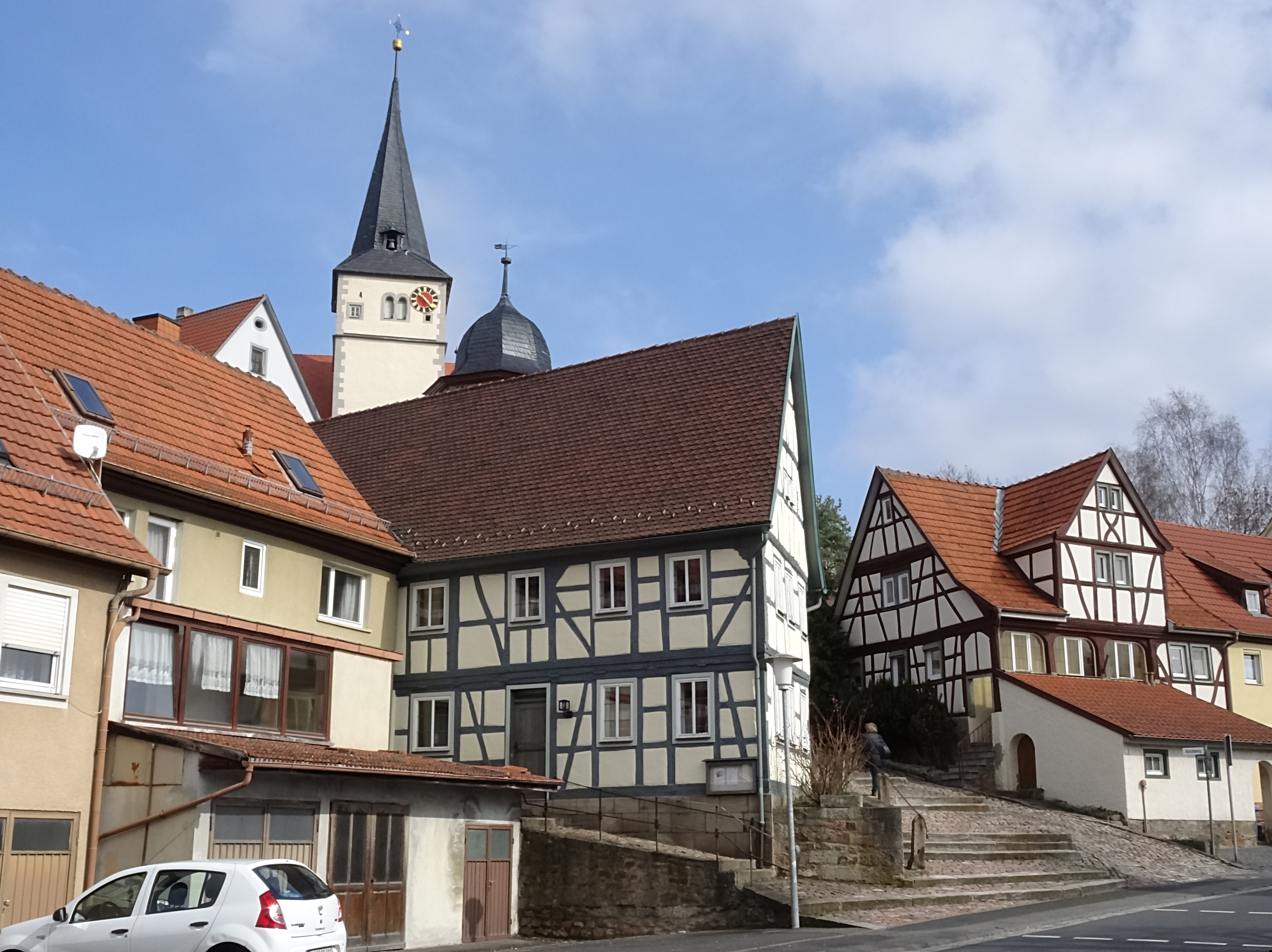 Nordheim vor der Rhön